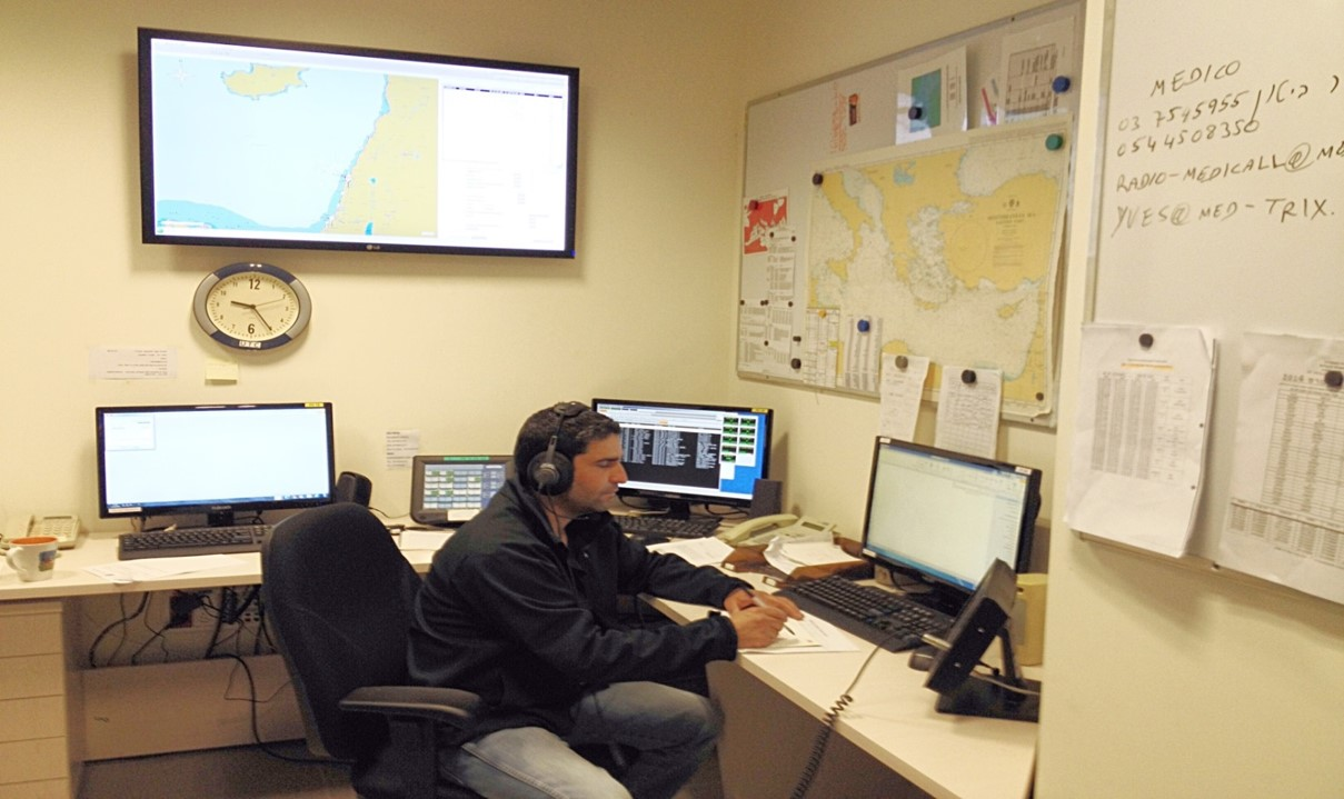 מפעיל המרכז בעת משמרתו